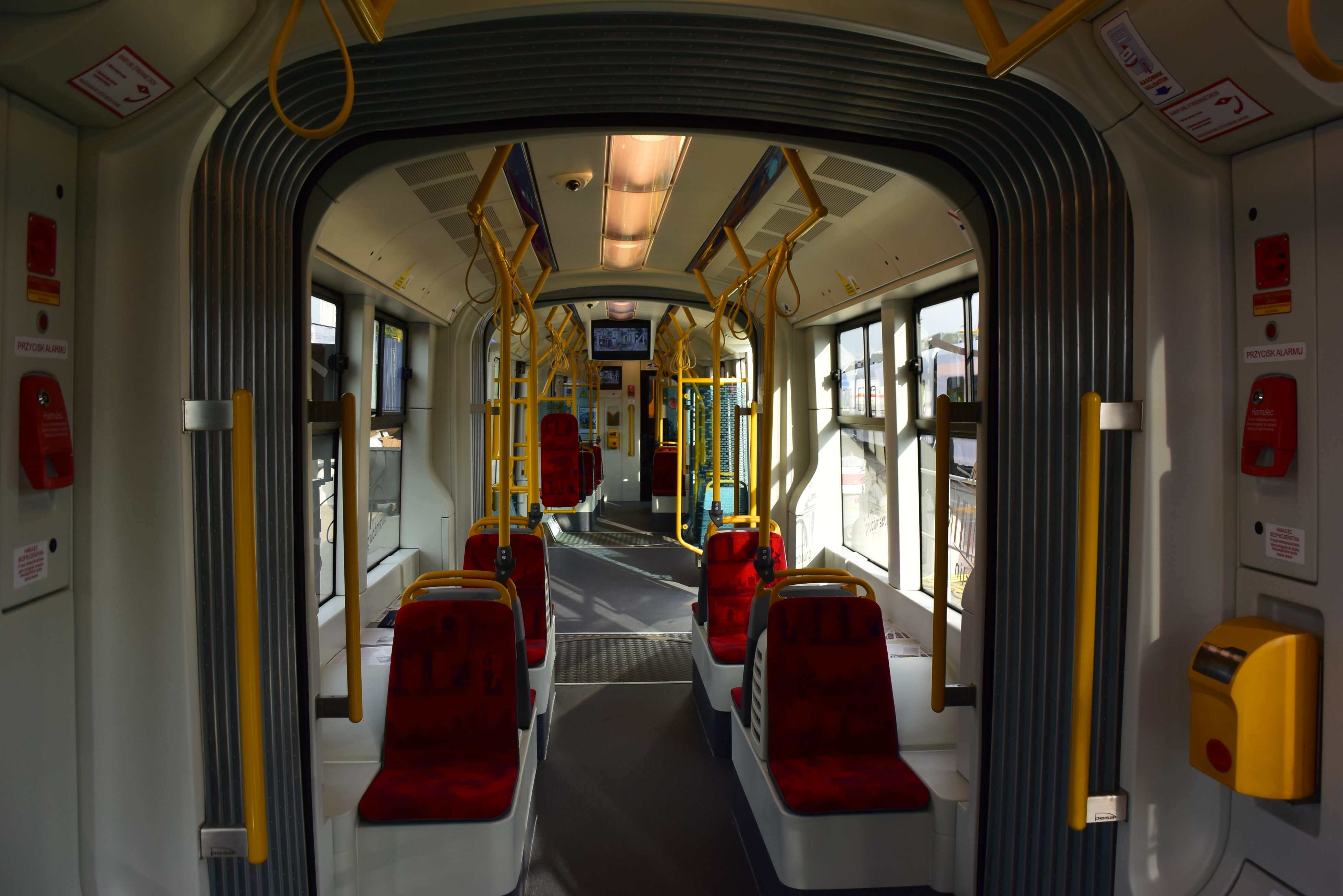 PESA Jazz podczas InnoTrans 2014